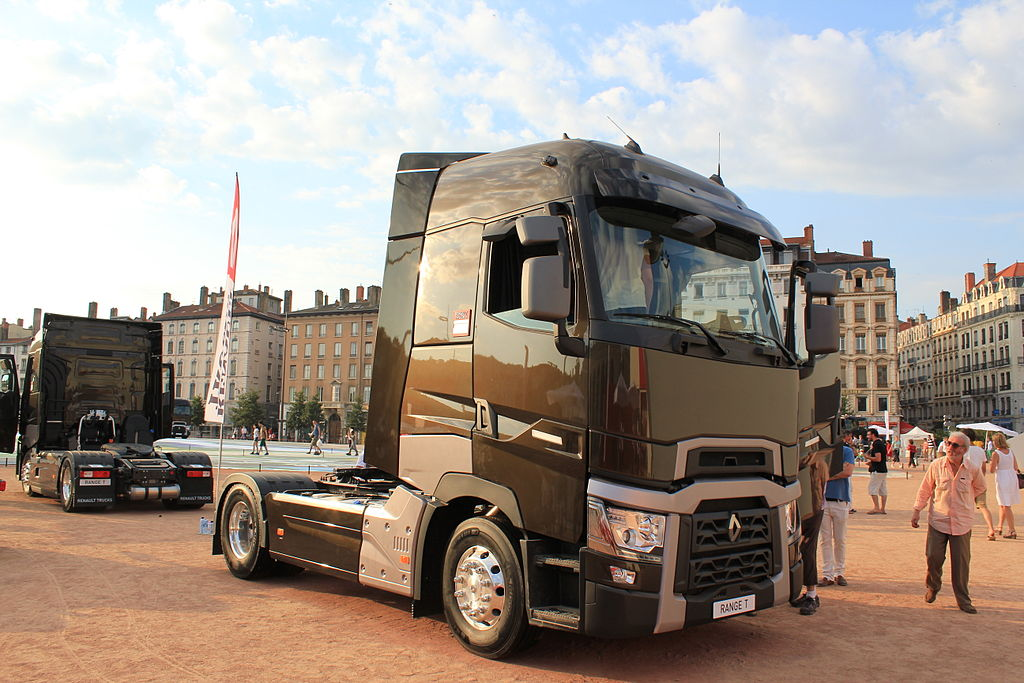 1024px-Renault T440 / Lyon Bellecour / Truck de Ouf